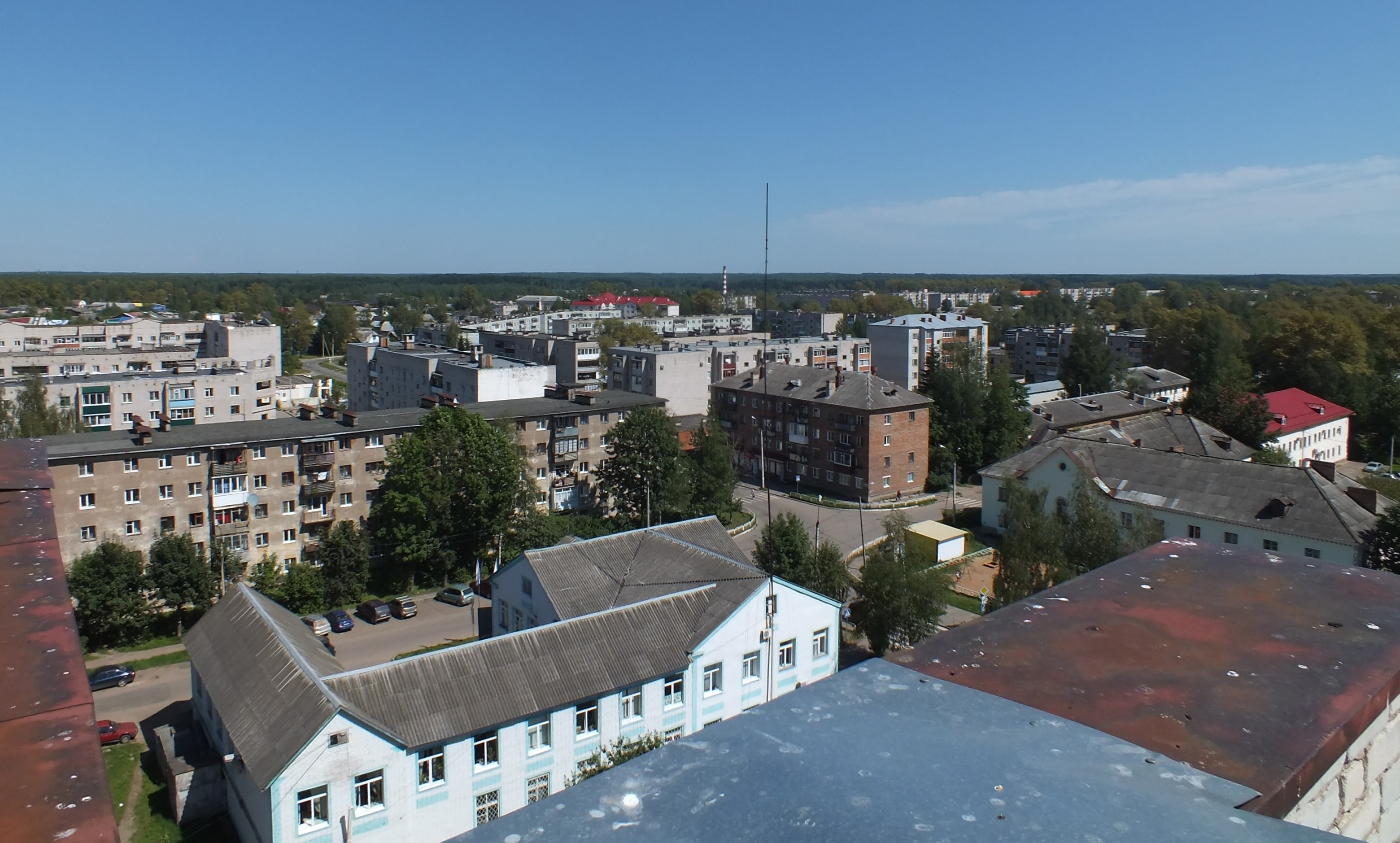 вид города с высоты